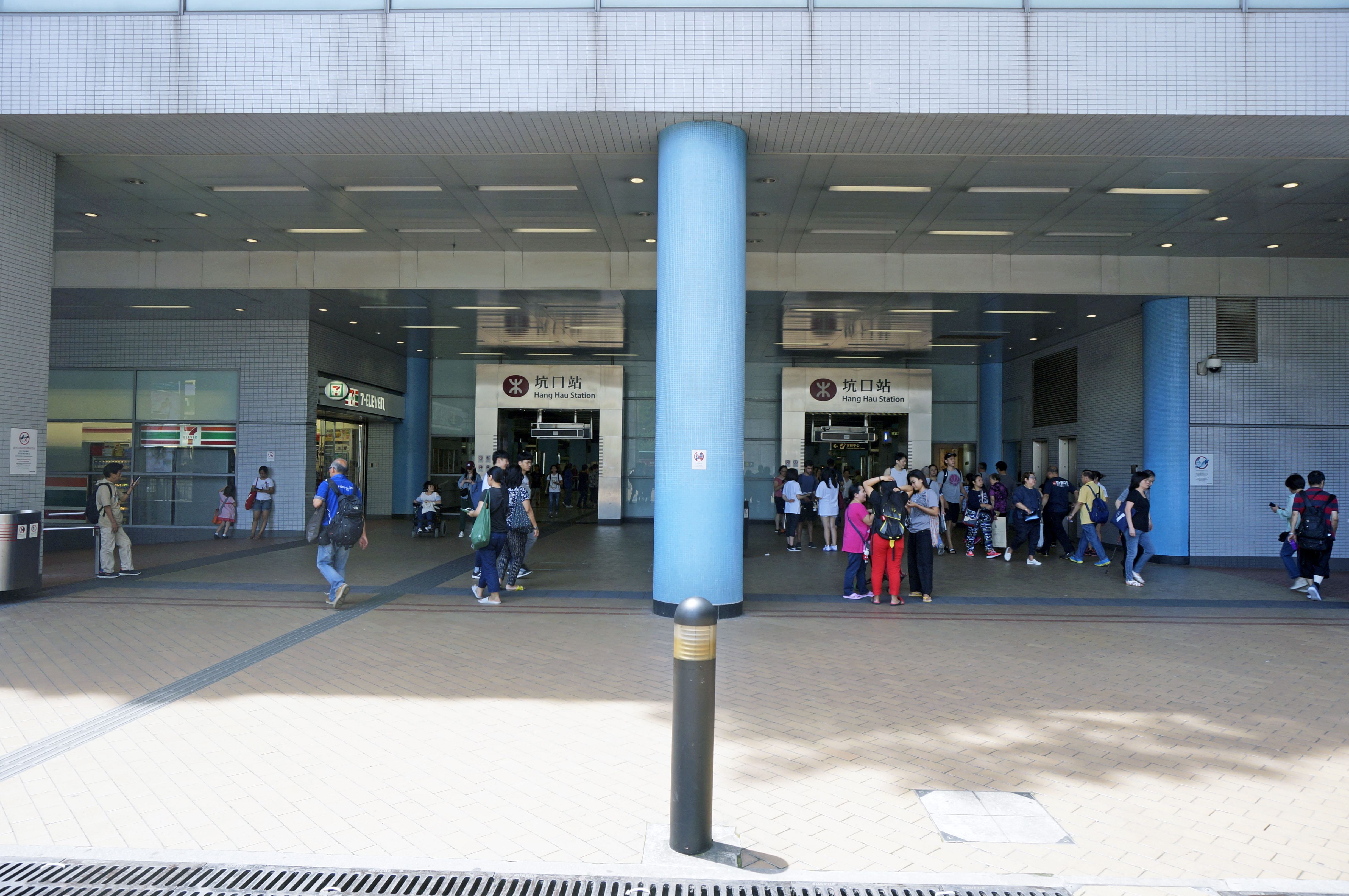 港鐵坑口站B出入口